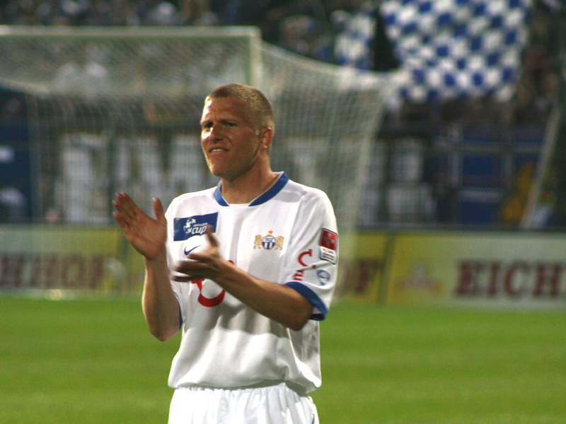 Marc Schneider, FCZ, Hardturm Stadion (Schweiz), Pokal Halbfinale, FC Zürich - FC Luzern 2:3